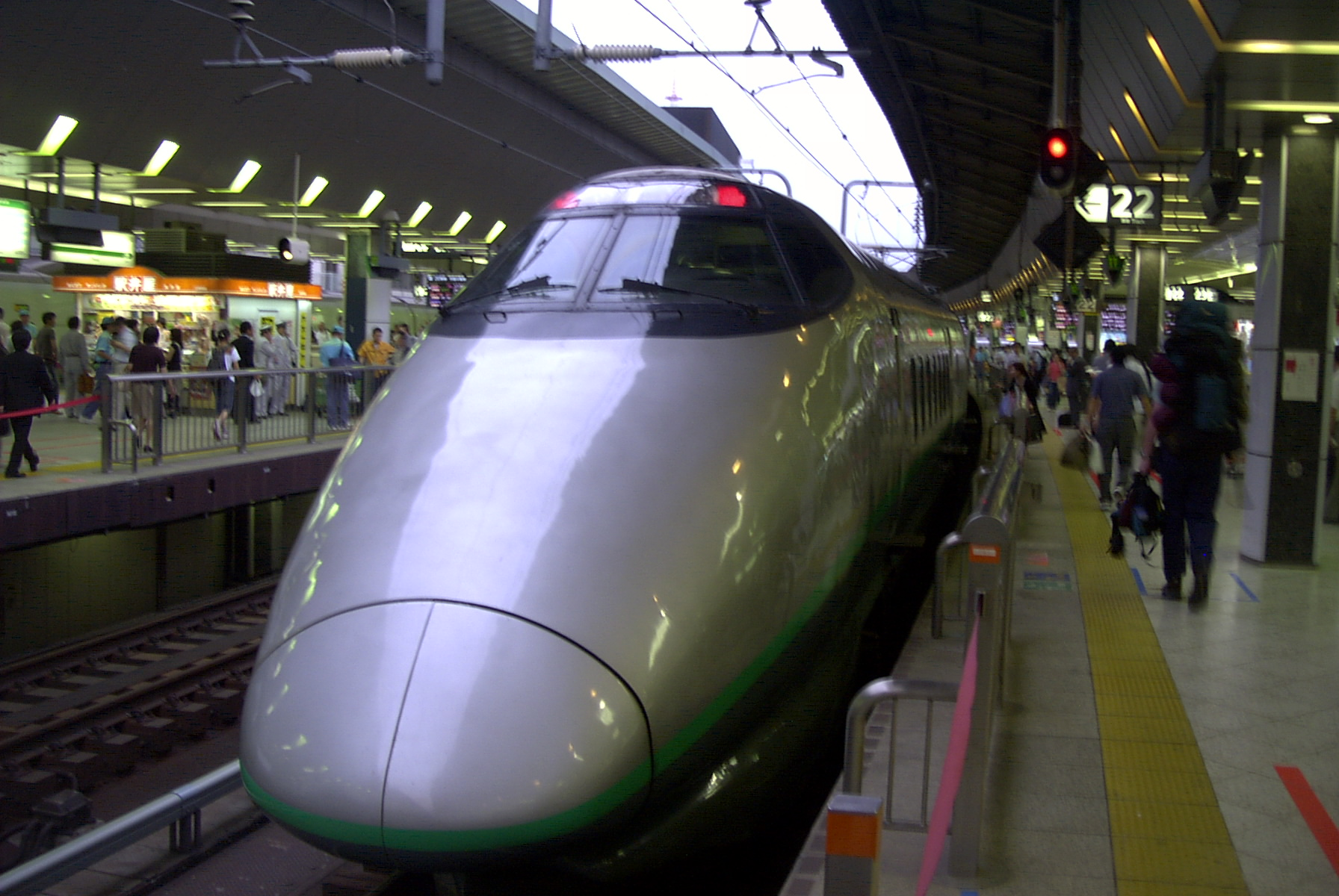 400 Series Shinkansen